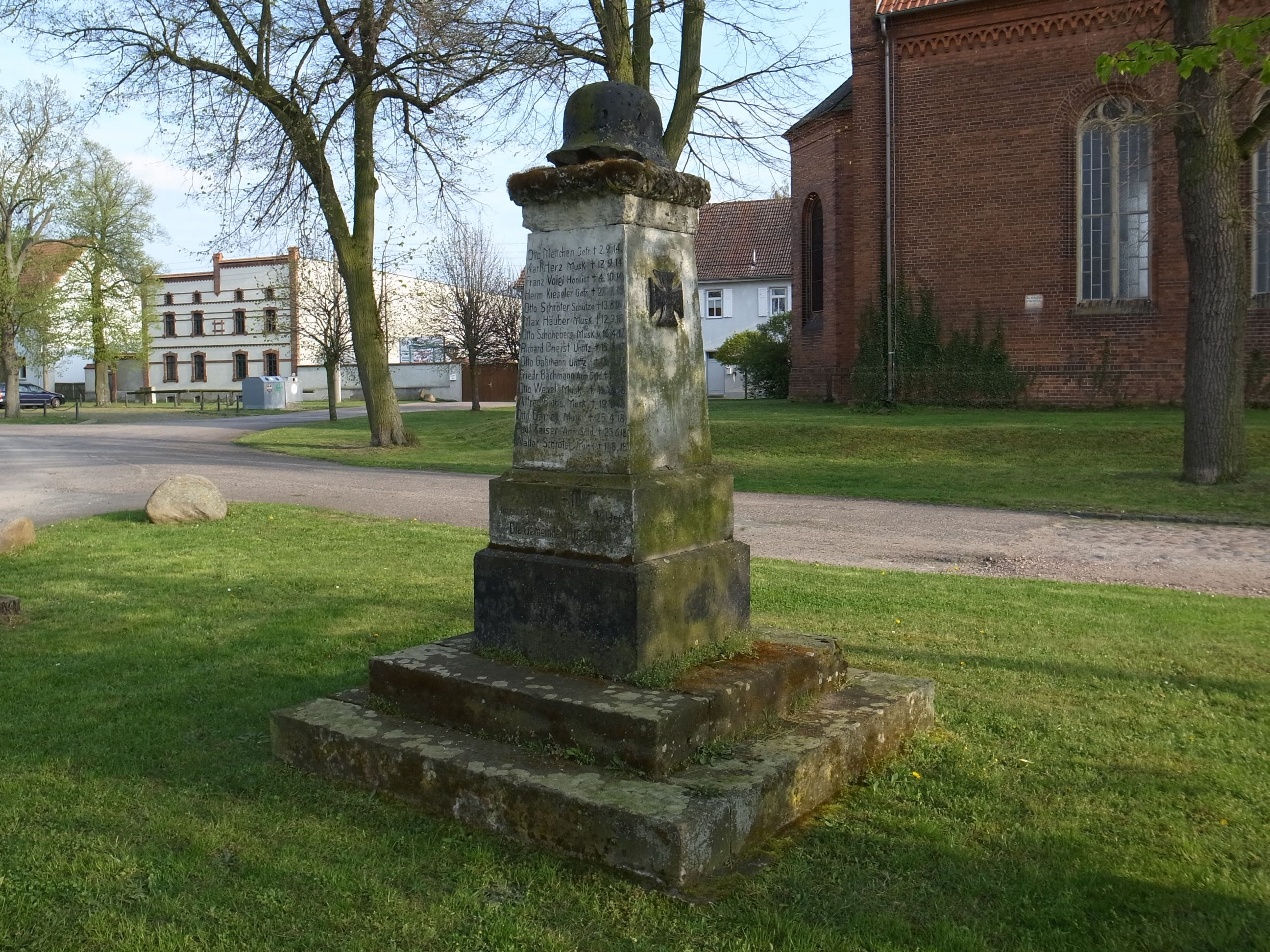 Hinsdorf, Gefallenen-Denkmal 1914-1918